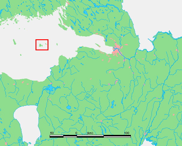 Lavansaari